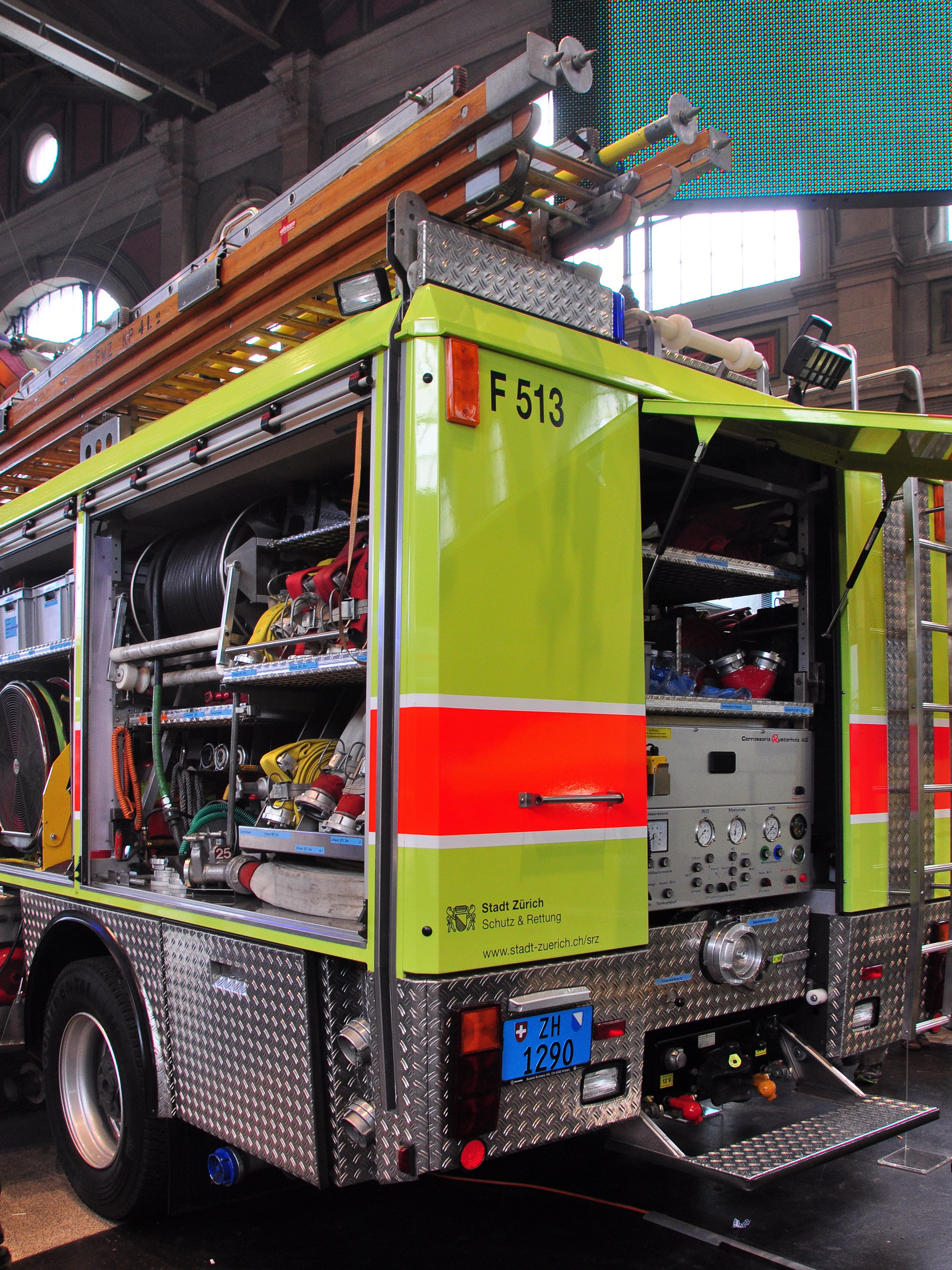 10 Jahre SRZ Jubiläumsanlass (13. und 14. Mai 2011) von Schutz & Rettung in der Haupthalle des Hauptbahnhofs in Zürich (Switzerland)